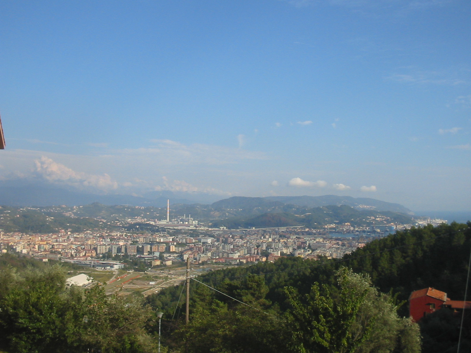 Udsigt over byen.